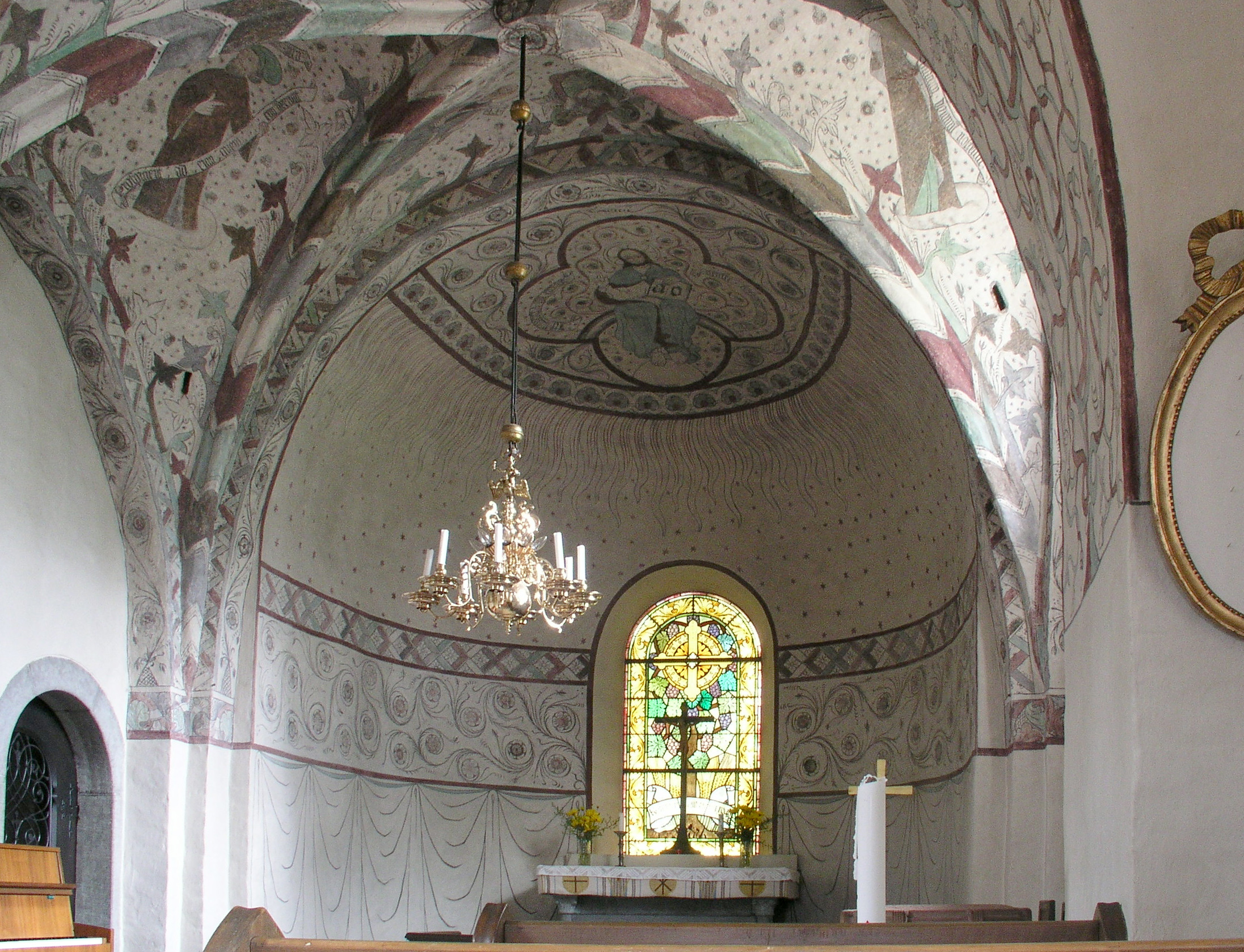 Kaga kyrka / Kaga church. Linköping, Sweden. Altar.